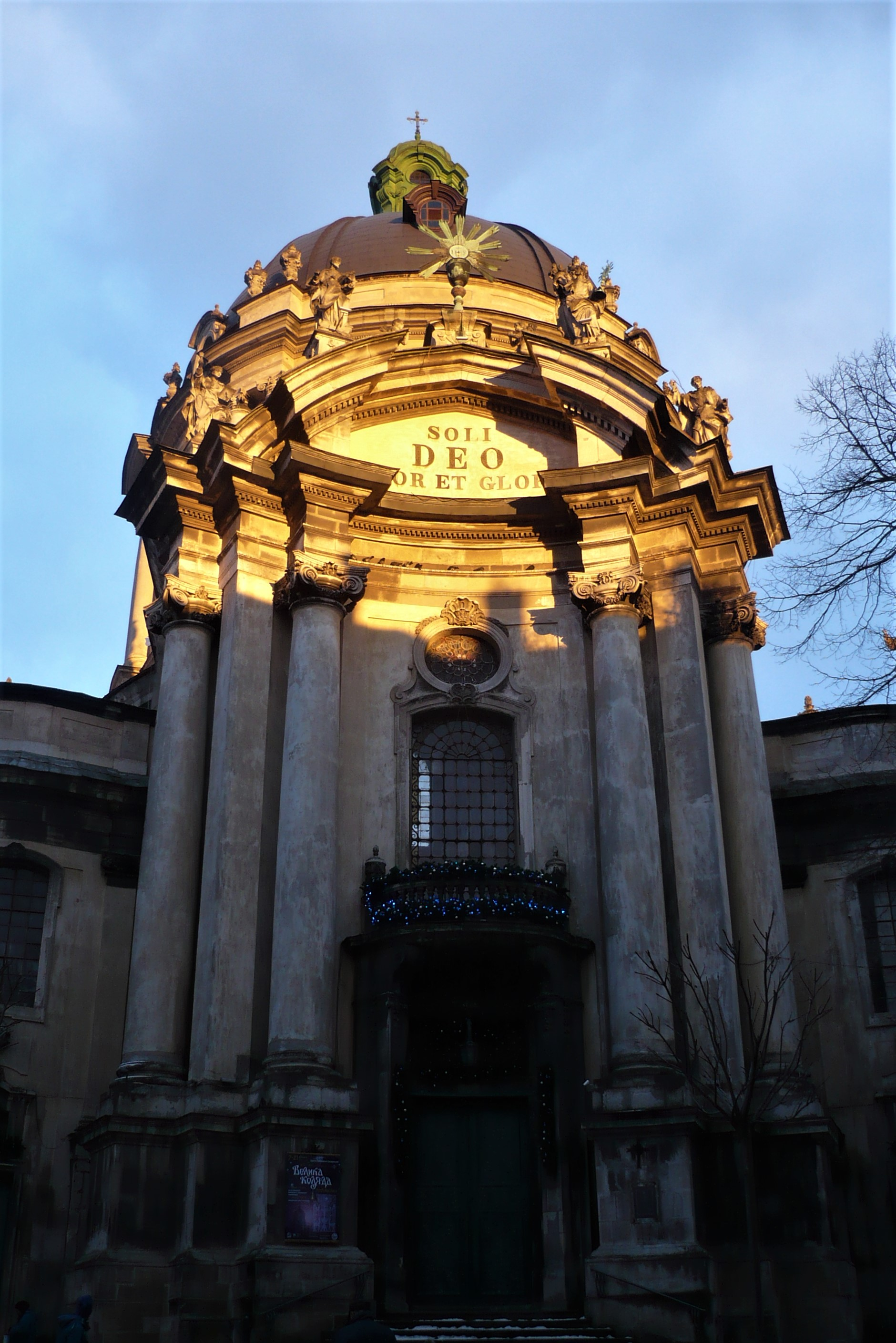 Kościół oo. dominikanów